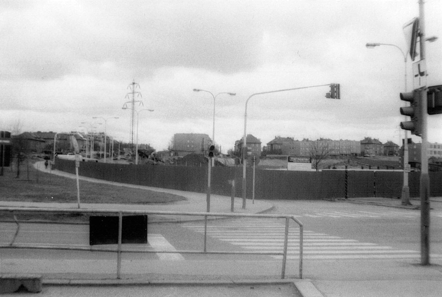 Praha, Strašnice, výstavba stanice metra Skalka.